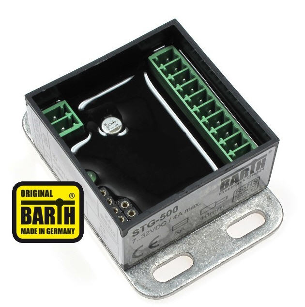 Mini-SPS STG500 mit PIC18F